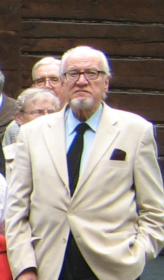 Pekka Salomaa